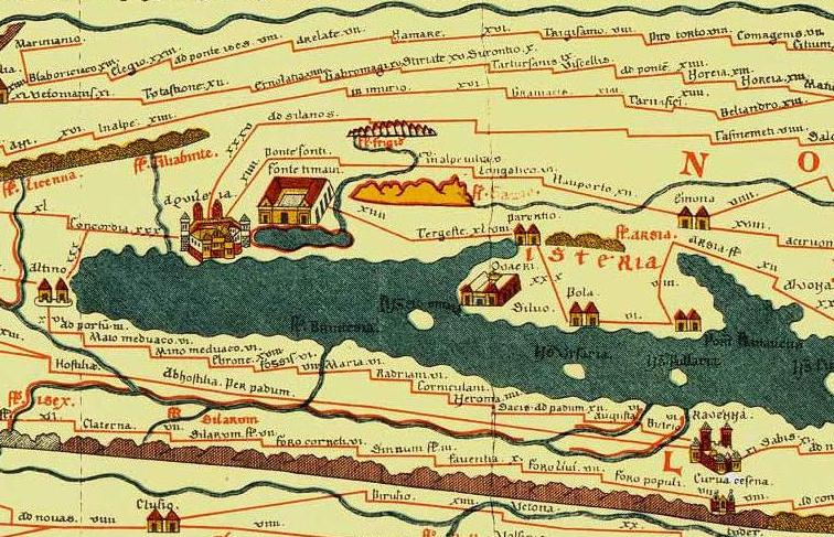 Questo File è stato ricavato (estrazione dettaglio) da un’altra immagine in archivio – File:TabualPeutingeriana.jpg inserita il 10 lug 207 da utente World Imaging